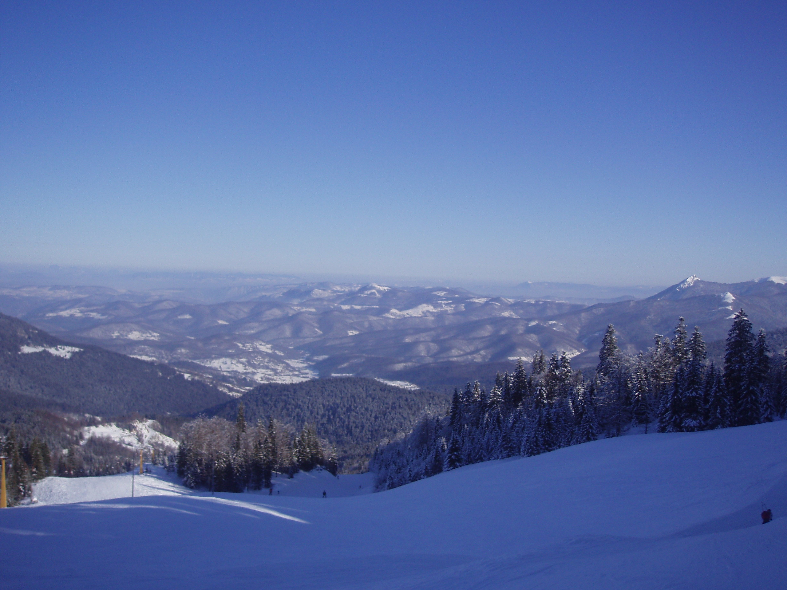 Jahorina